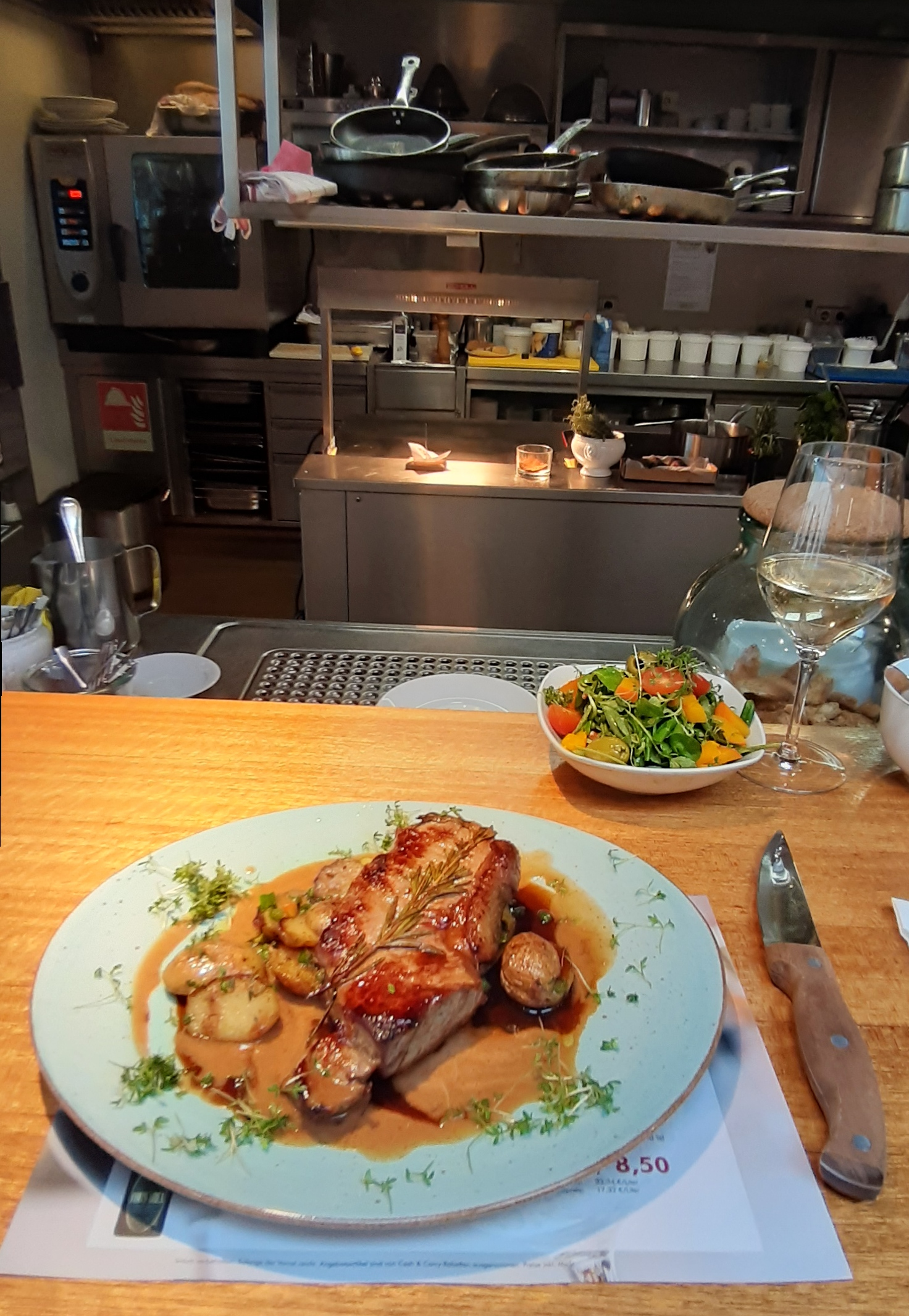 Dry-Aged-Steak im Bistro des FrischeParadies in Hürth bei Köln